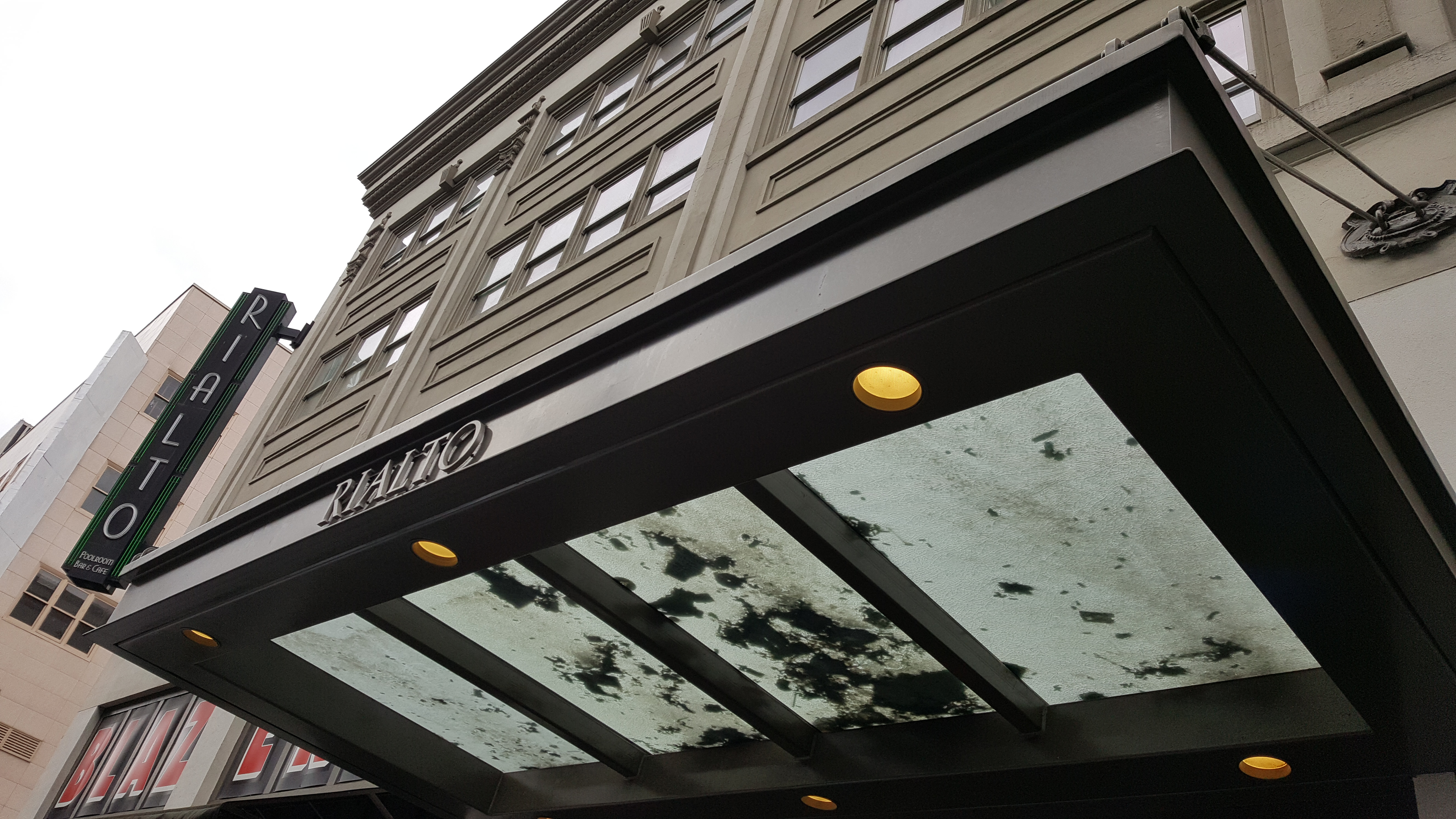 Rialto